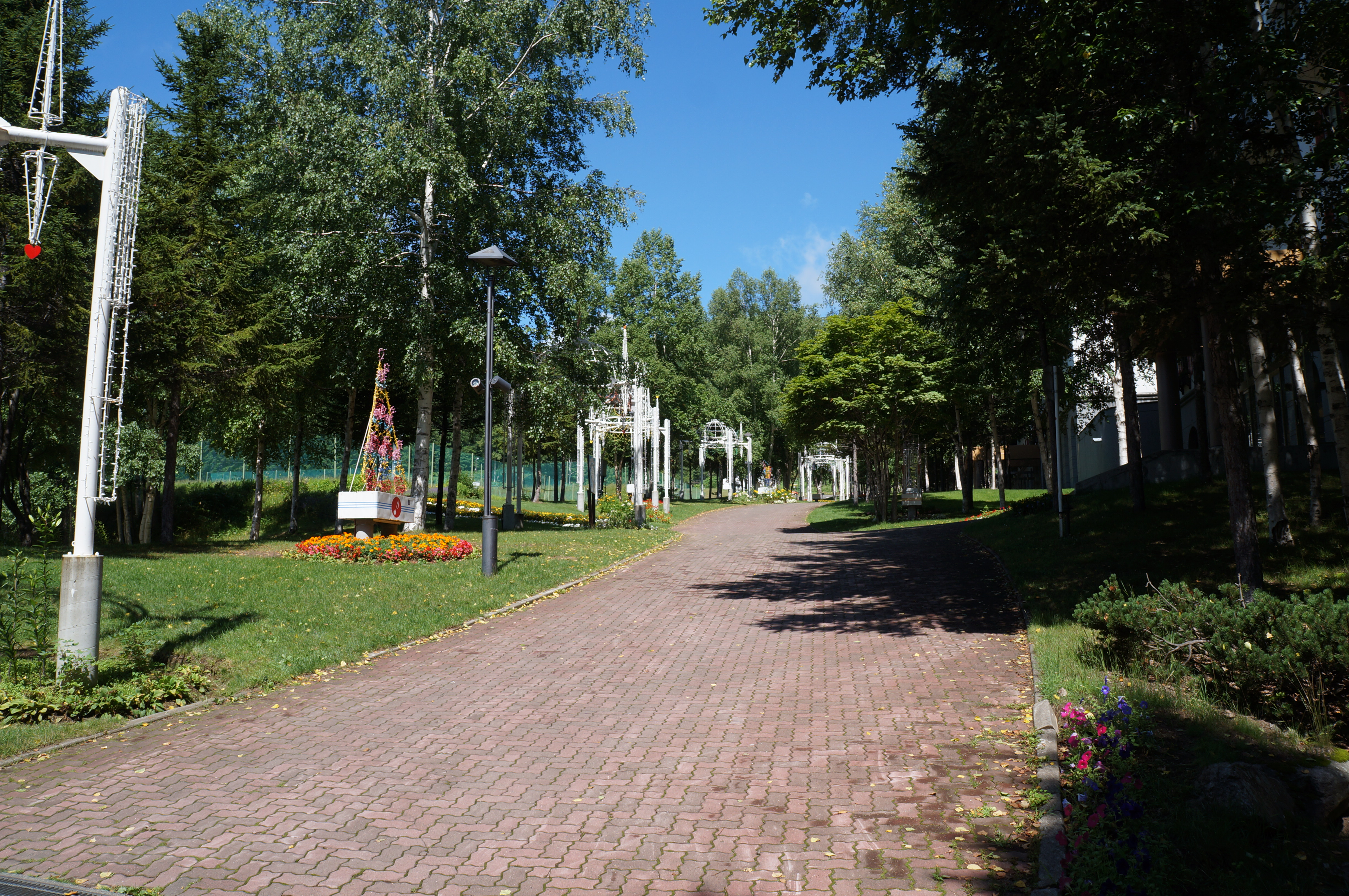 Izumikawa, Rusutsu, Abuta District, Hokkaido Prefecture 048-1711, Japan